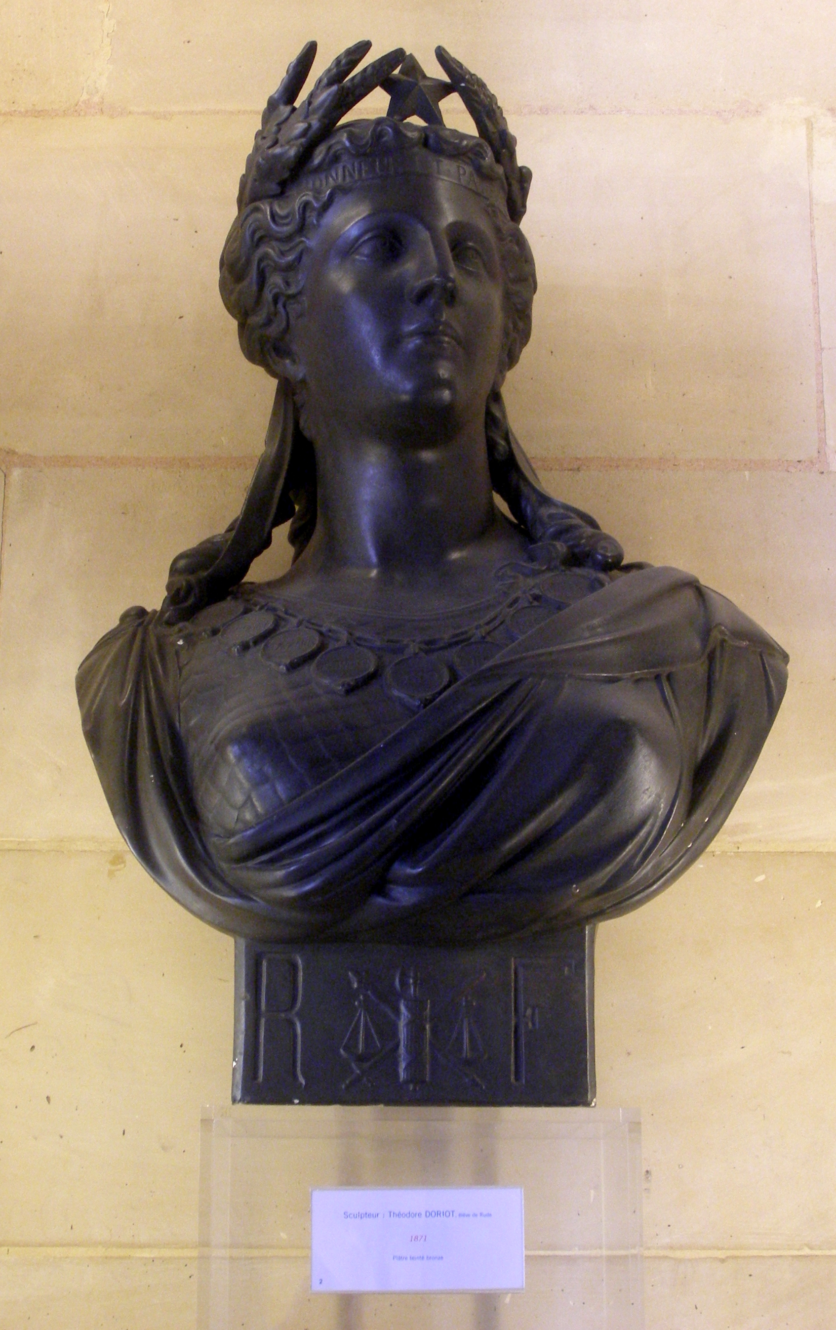 Théodore Doriot (français, ?-?, XIXe siècle, mort depuis plus de 70 ans, élève de François Rude): Marianne, buste, fin XIXe siècle. Plâtre teinté bronze. Sur le front, un bandeau porte la devise "Honneur et Patrie".